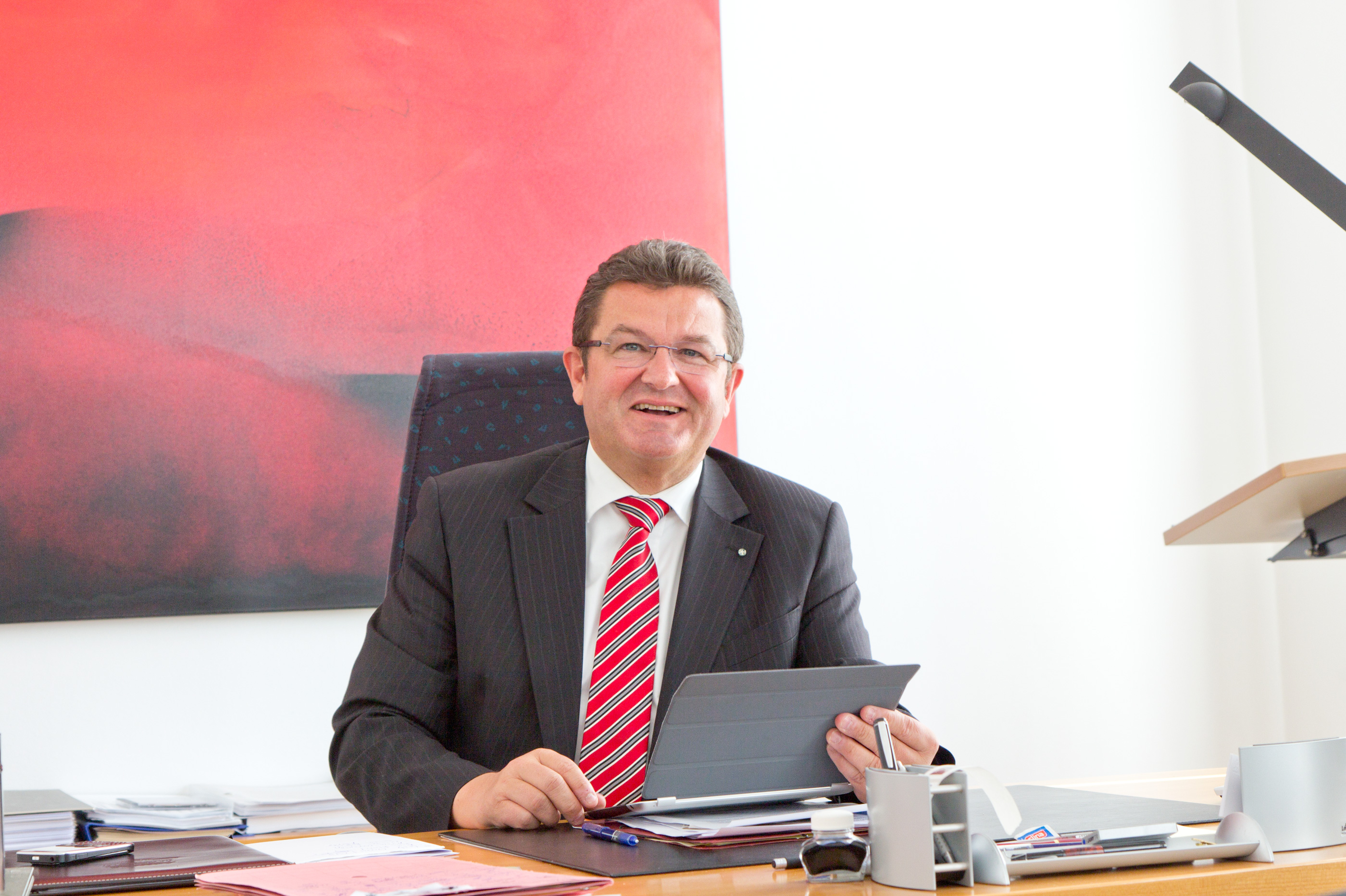 Wikipedia im Landtag – Bayern 17. bis 19. Juli 2012 in München Dieses Foto wurde im Rahmen des Projektes „Wikipedia im Landtag“ erstellt.